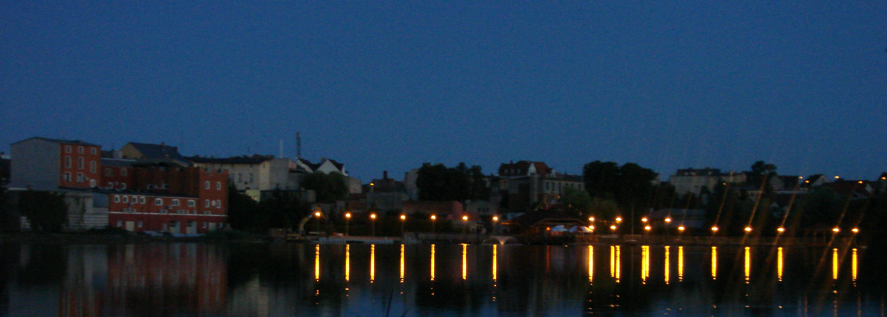 Panorama centrum Sępólna Krajeńskiego, od strony Jeziora Sępoleńskiego. City - Sępólno Krajeńskie, Poland.